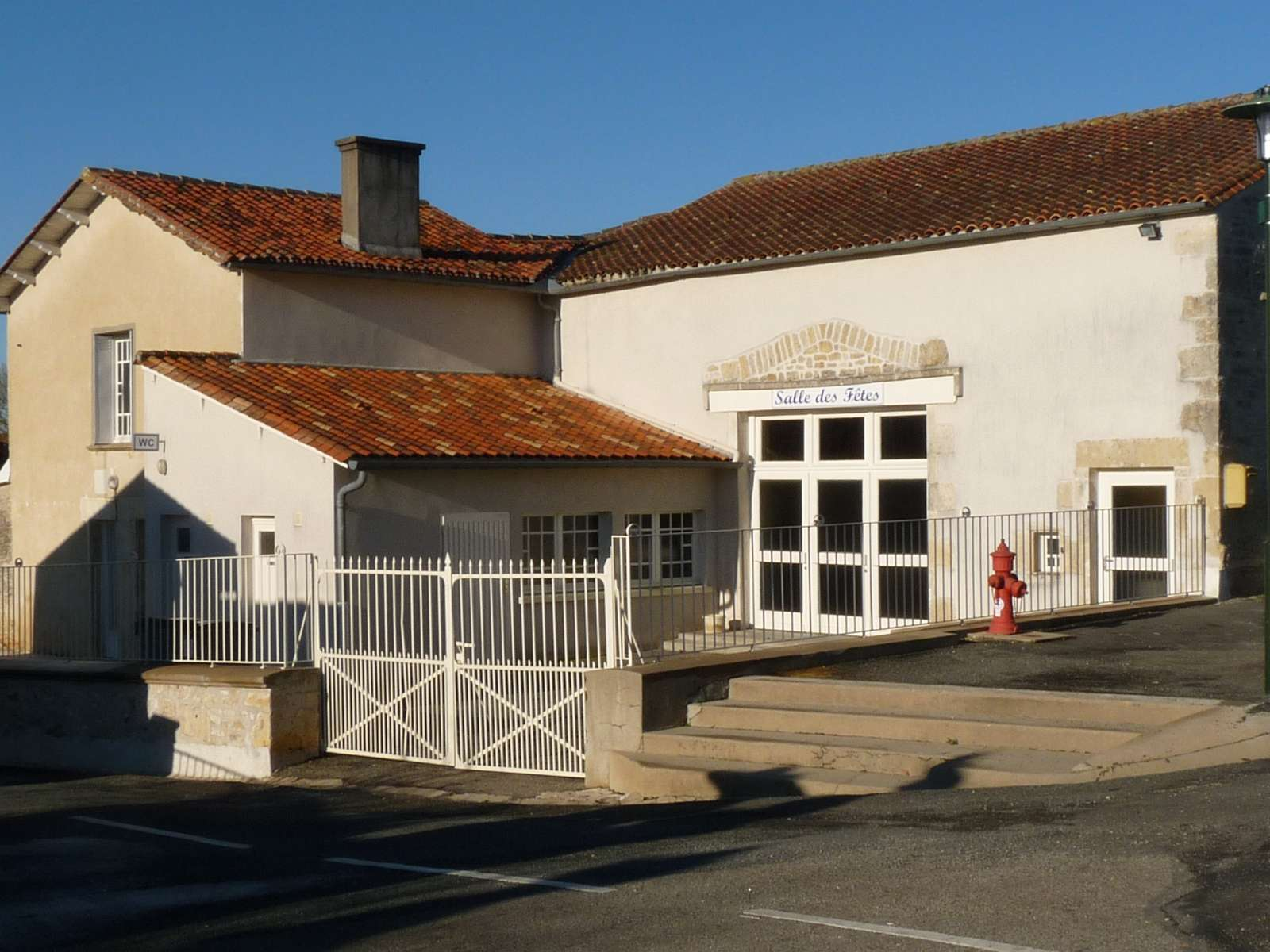 salle des fêtes de Lonnes, Charente, France